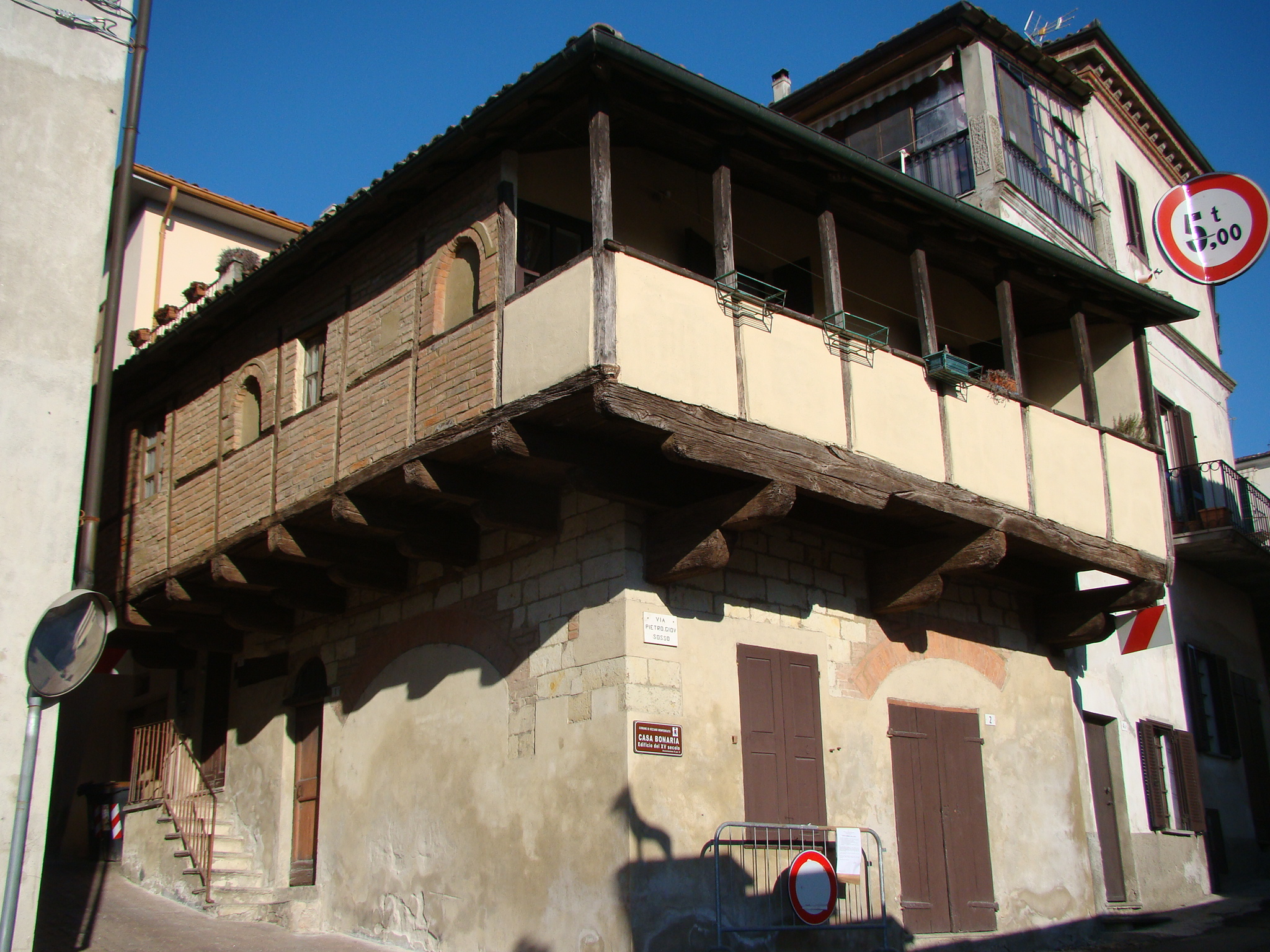 casa Bonaria-Simonetti fine XV ° secolo